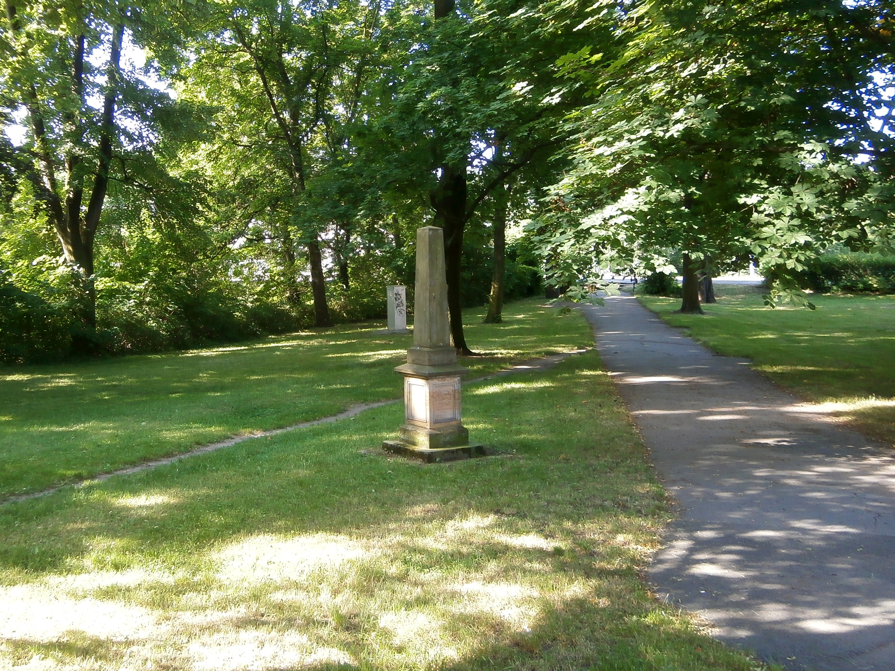 Sady Vítězslava Nováka (původně Vonešovy sady)